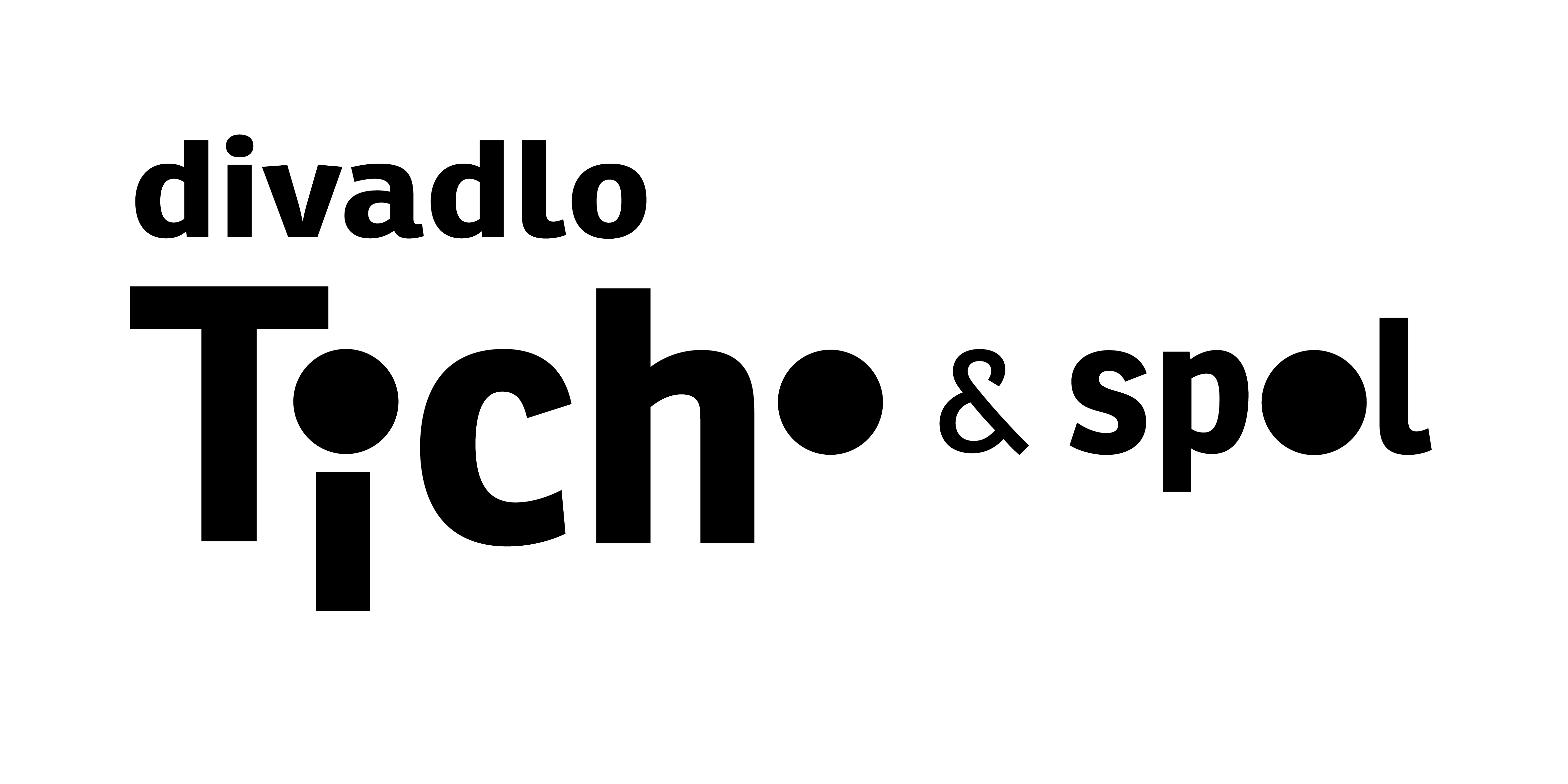 Profesionálne komorné divadlo v centre Bratislavy